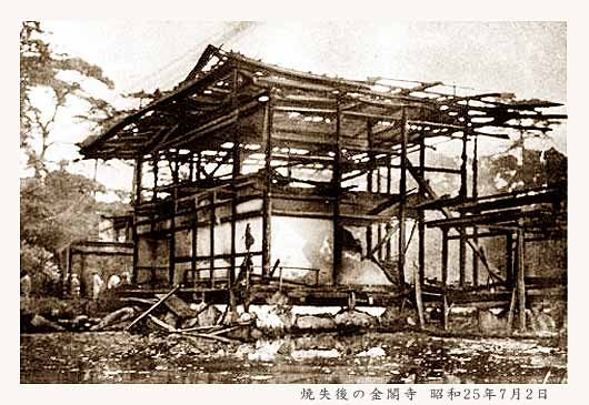 Kinkaku-ji after arson